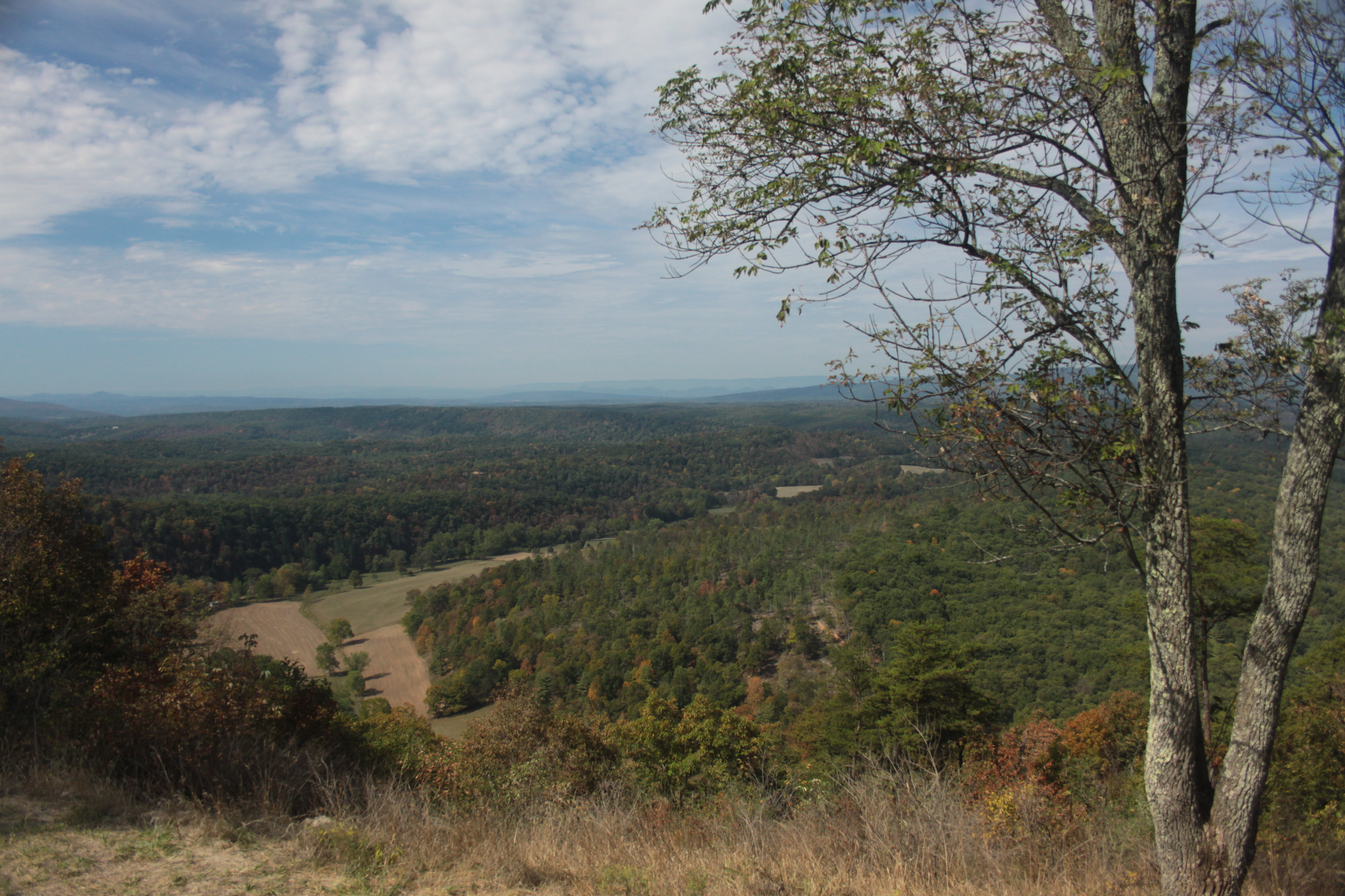 Allegany Co., MD